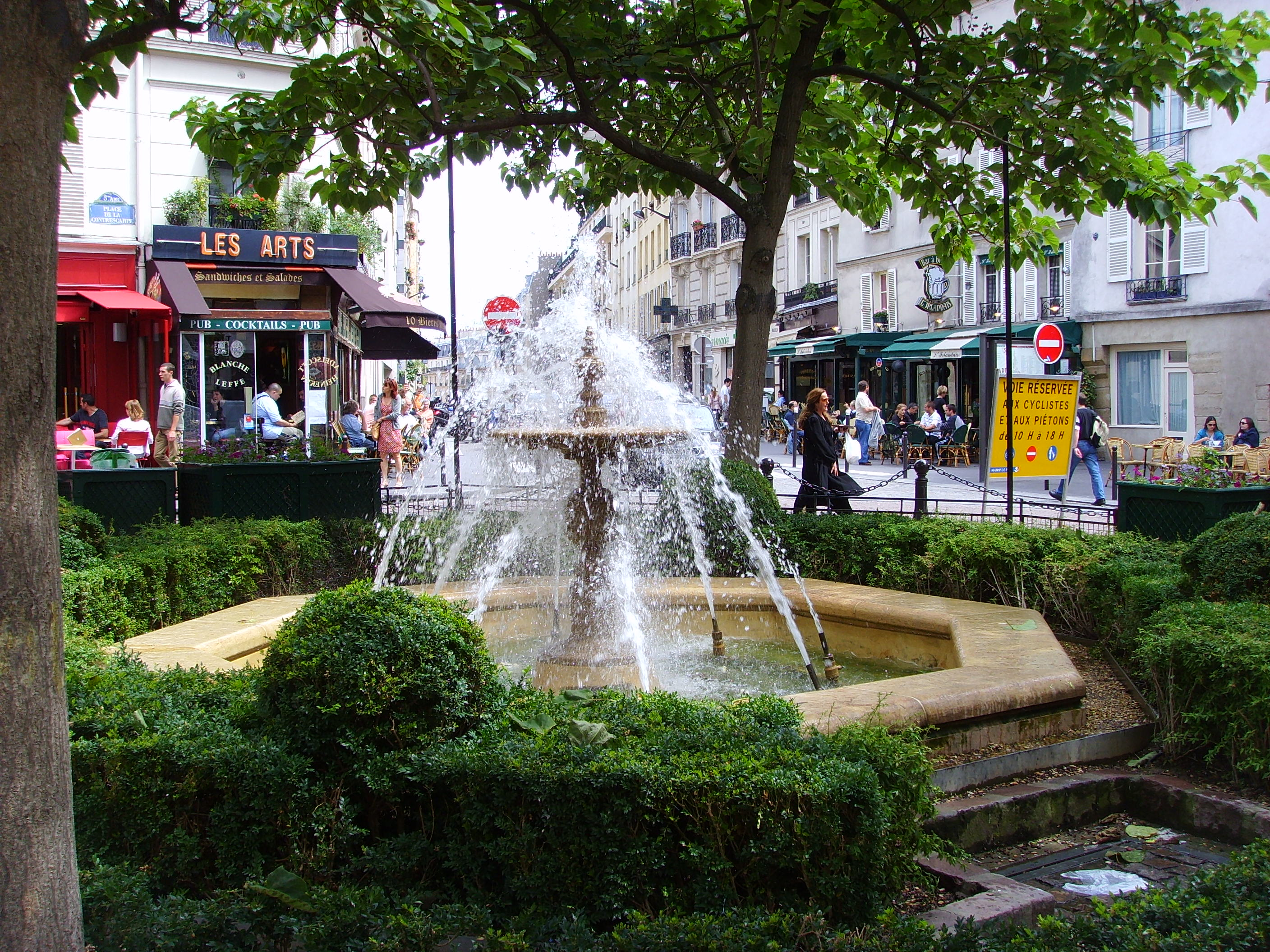 Fountain in Paris, Place de la Contrescarpe, Paris 5e arr.